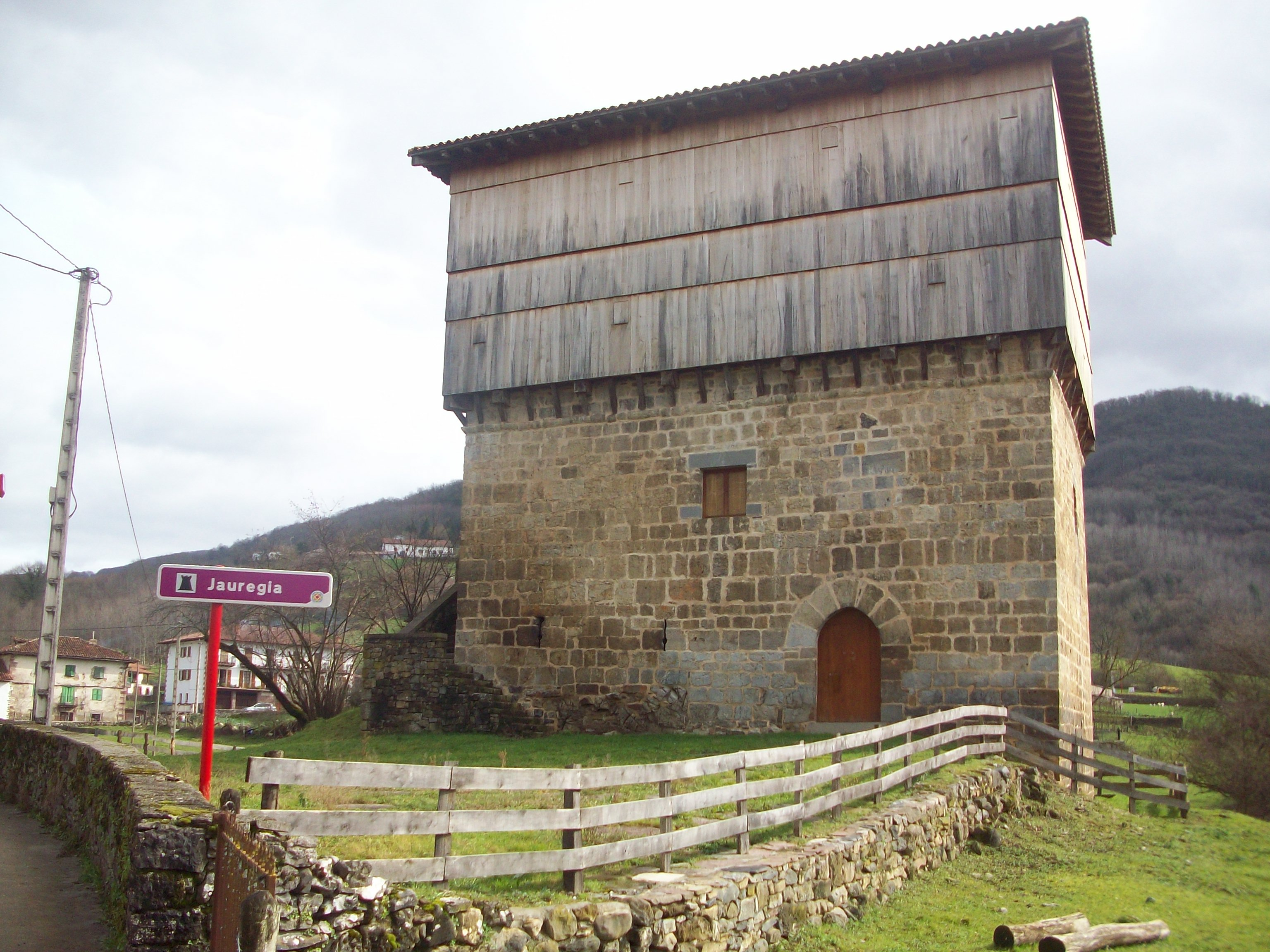 Malerrekako Donamaria udalerrian dagoen Jauregia dorretxea. Nafarroa, Euskal Herria.